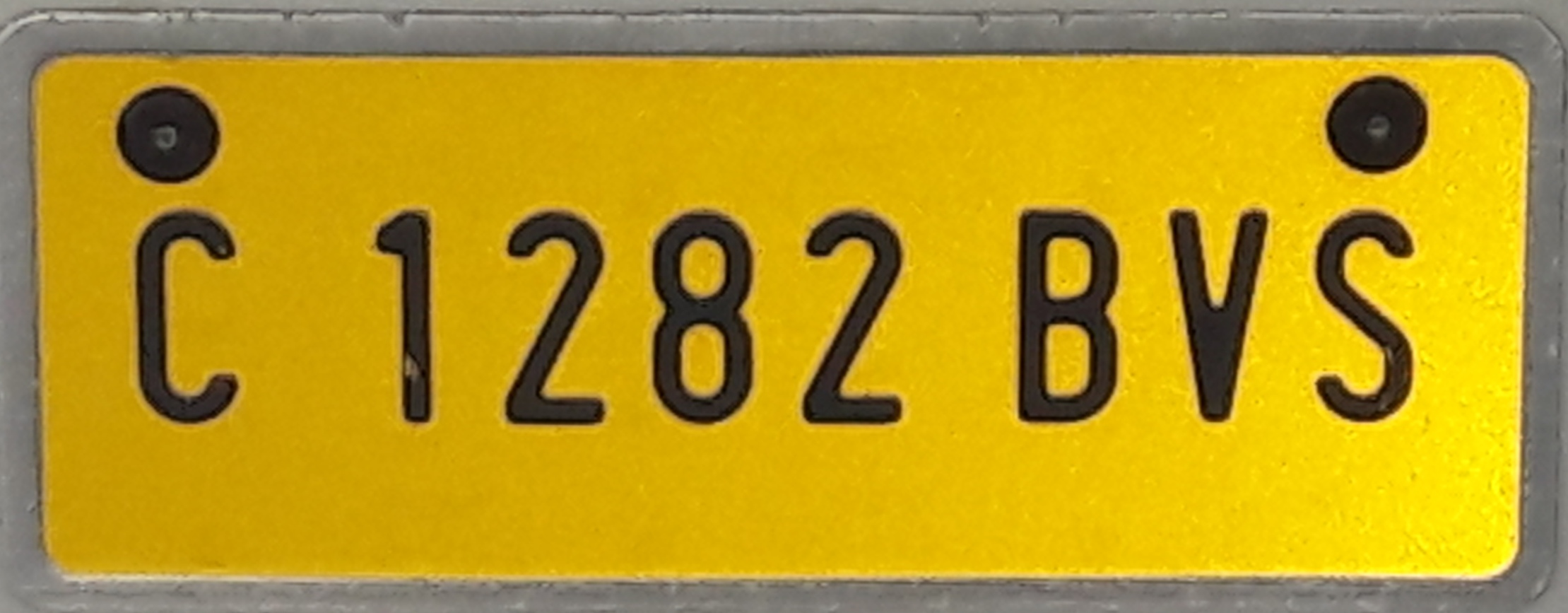 Brommobiel kenteken in Spanje